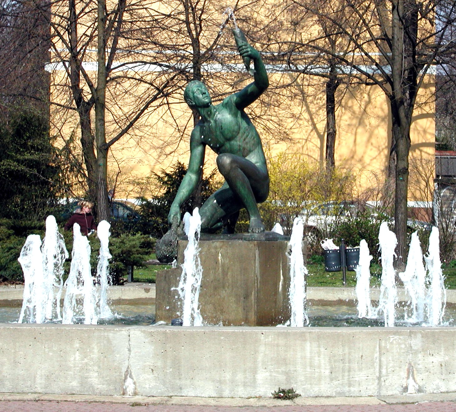 Der Brunnen Jüngling mit Fisch (1925) by Hans Latt in Berlin-Lichtenberg/Berlin/Germany